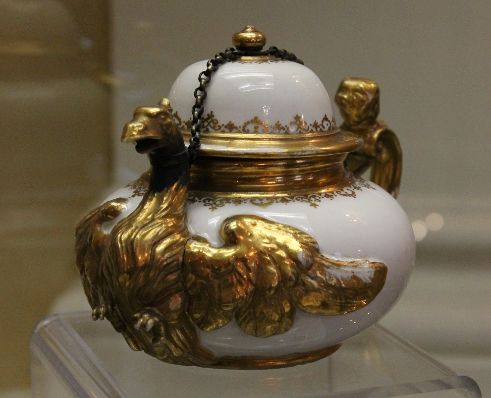 Adler-Teekanne mit Goldstaffage, Form Johann Jacob Irminger (1635–1724) zugeschr., Meißen, um 1725